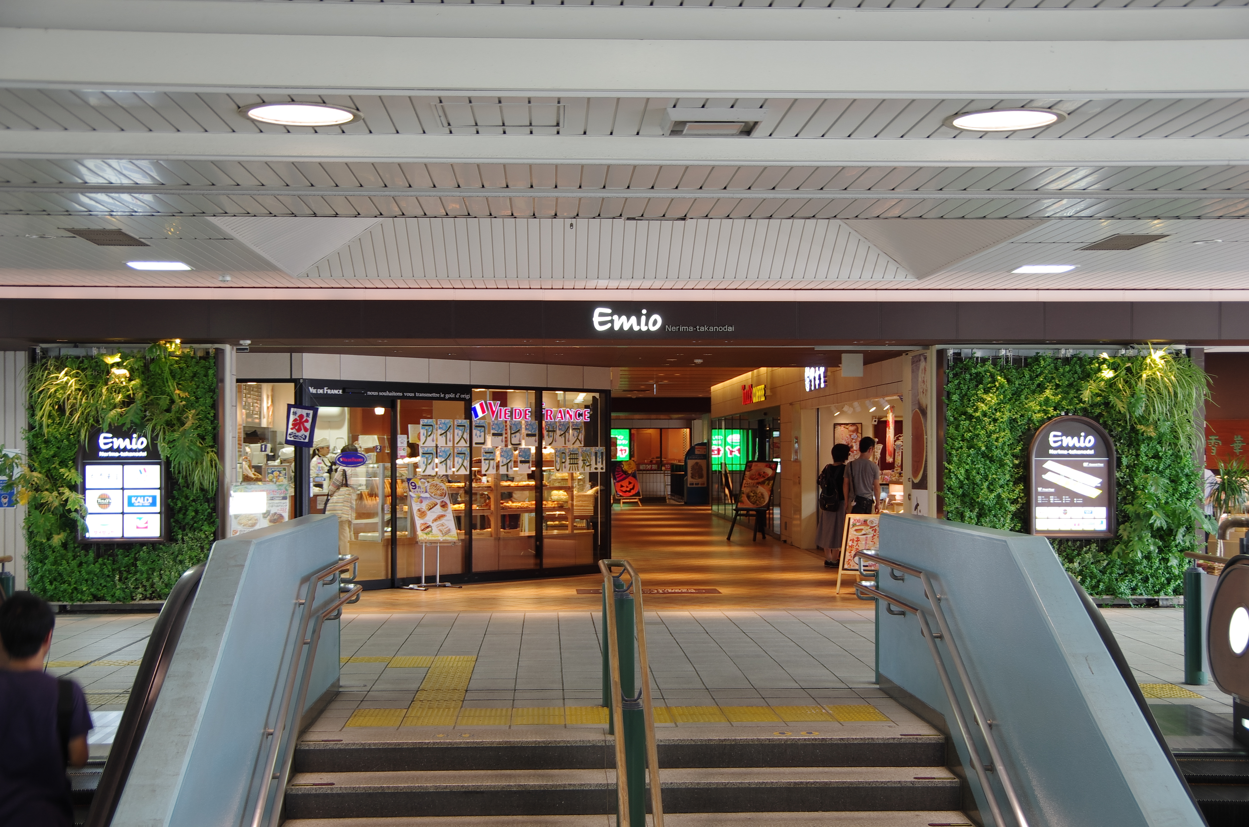 Emio練馬高野台を西武池袋線練馬高野台駅改札口側から撮影。